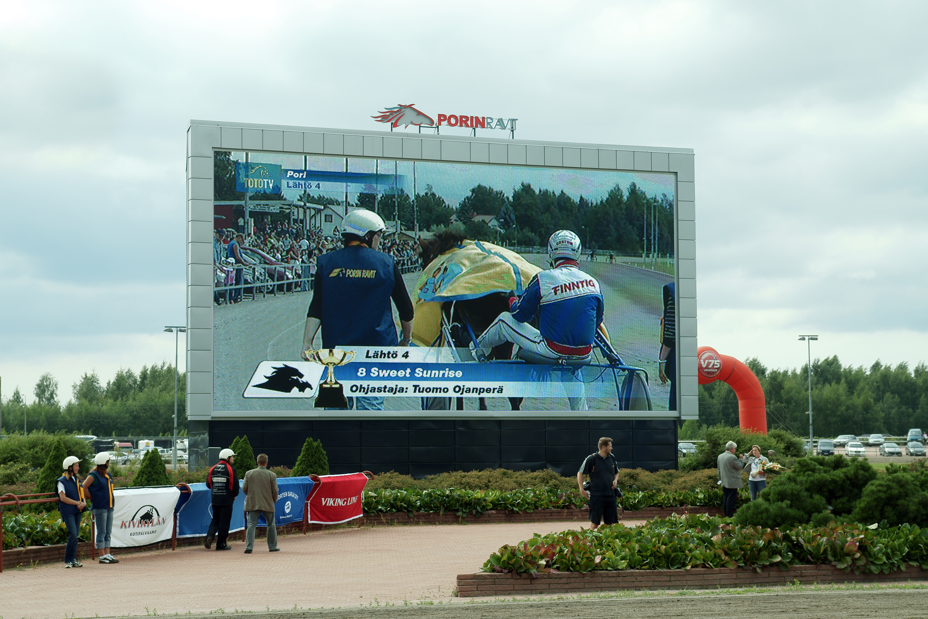 Porin raviradan jättinäyttö.